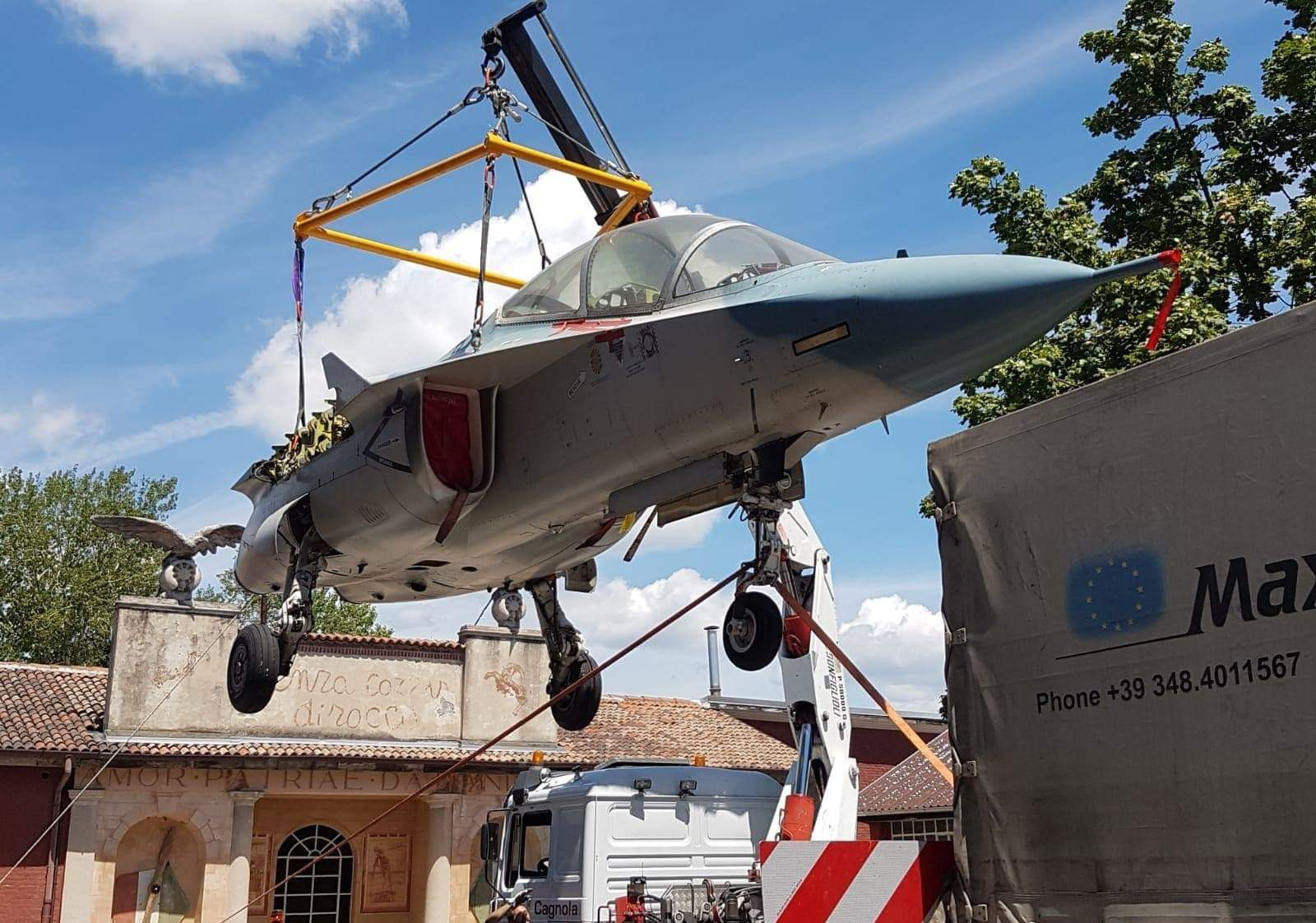 Un esemplare di M346 Master a Volandia